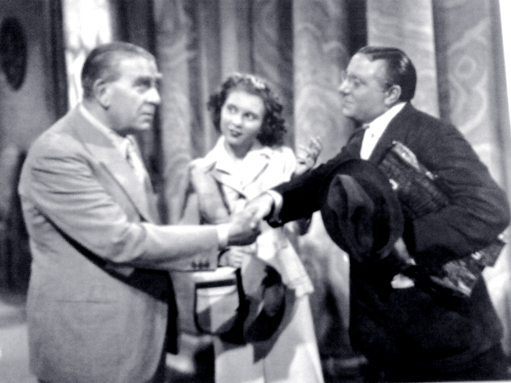 Armando Falconi, Chiaretta Gelli e Carlo Campanini ne "Il birichino di papà" (Matarazzo, 1943)